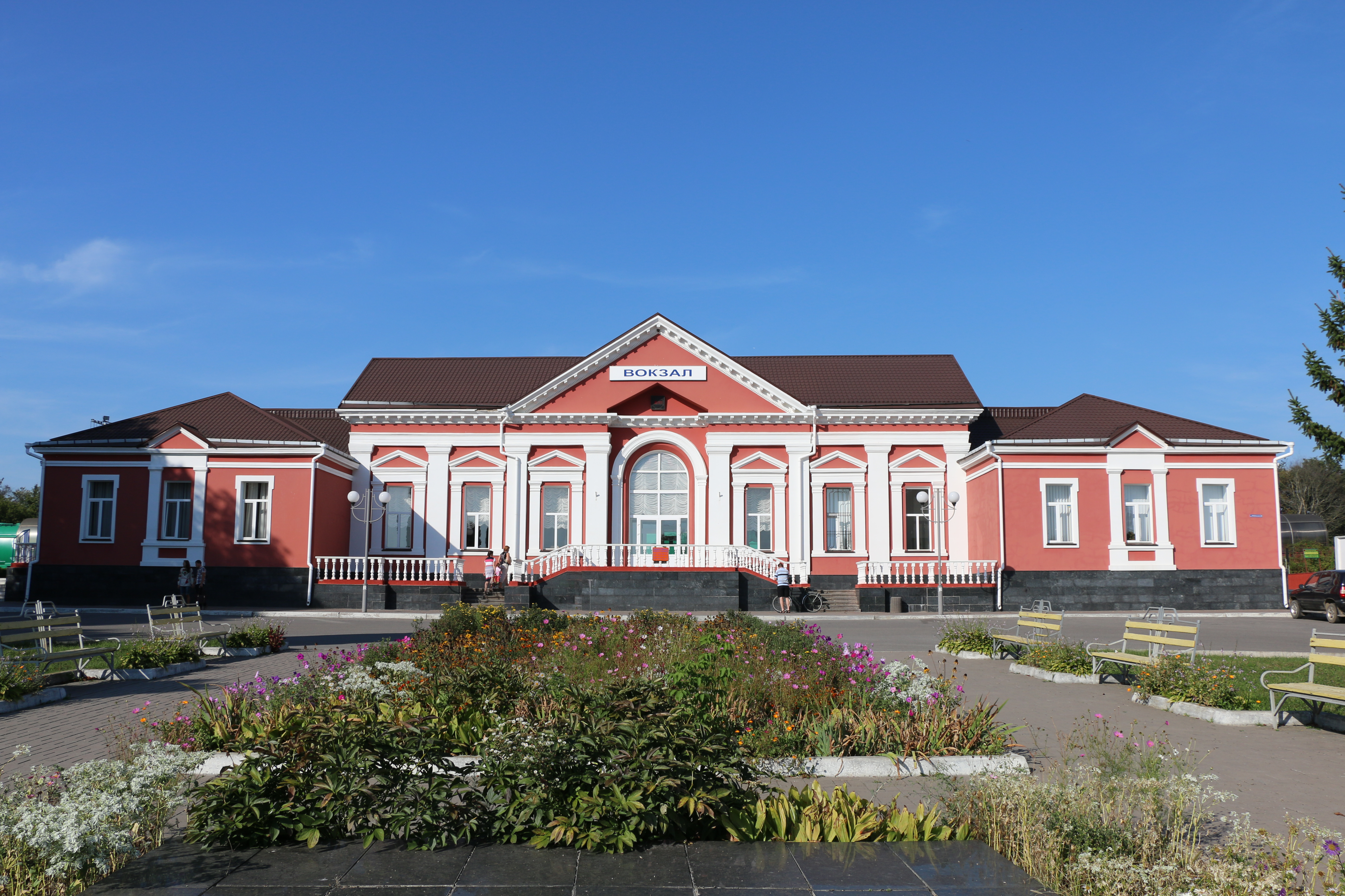 Залізничний вокзал, Хмільник, вул. Привокзальна, 2